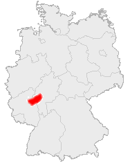 Bessere Version von Image:Karte Taunus Deutschland.png, die Ausdehnung des Taunus, basierend auf der Linie Lahnstein Boppard Oberwesel Bingen am Rhein Geisenheim Eltville am Rhein Wiesbaden Hofheim am Taunus Bad Soden am Taunus Bad Homburg vor der Höhe Friedberg Gießen Wetzlar Solms Weilburg Limburg an der Lahn Diez Nassau Bad Ems Lahnstein Better version of Image:Karte Taunus Deutschland.png, the Taunus mountains, based upon the line between the Citys/Villages Lahnstein Boppard Oberwesel Bingen am Rhein Geisenheim Eltville am Rhein Wiesbaden Hofheim am Taunus Bad Soden am Taunus Bad Homburg vor der Höhe Friedberg Gießen Wetzlar Solms Weilburg Limburg an der Lahn Diez Nassau Bad Ems Lahnstein